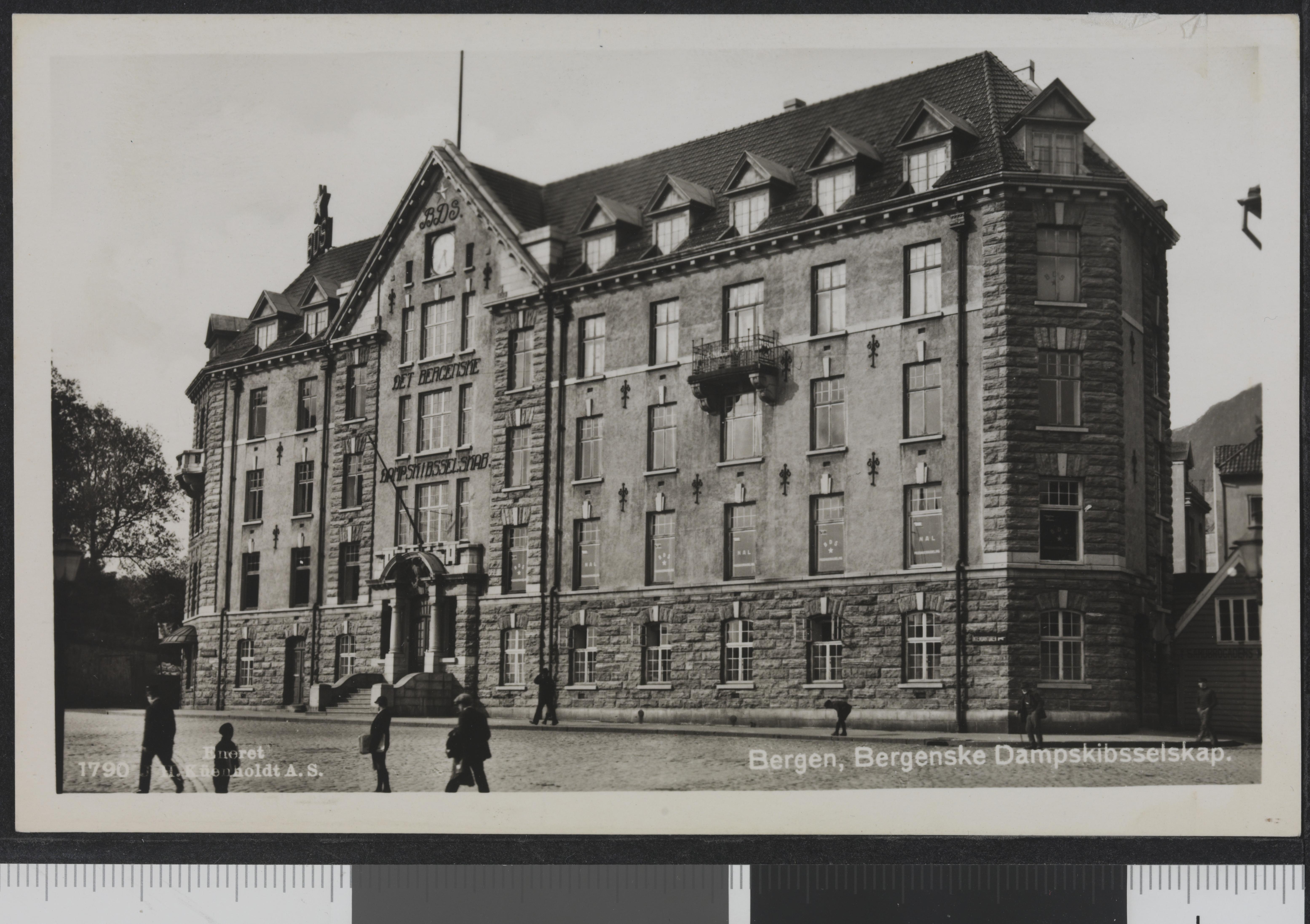 Bildet er hentet fra Nasjonalbibliotekets bildesamling Bergen, Hordaland